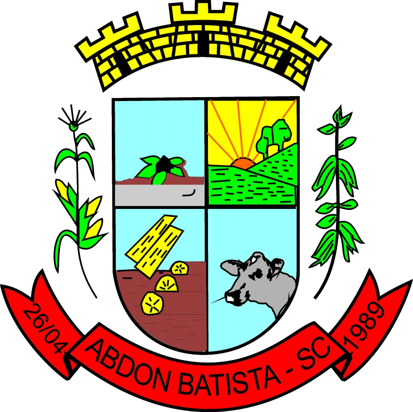 Brasão de Armas de Abdon Batista